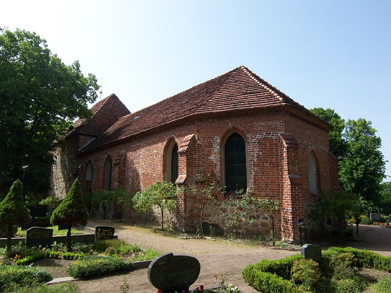 Kirche in Pinnow, Landkreis Ludwigslust-Parchim